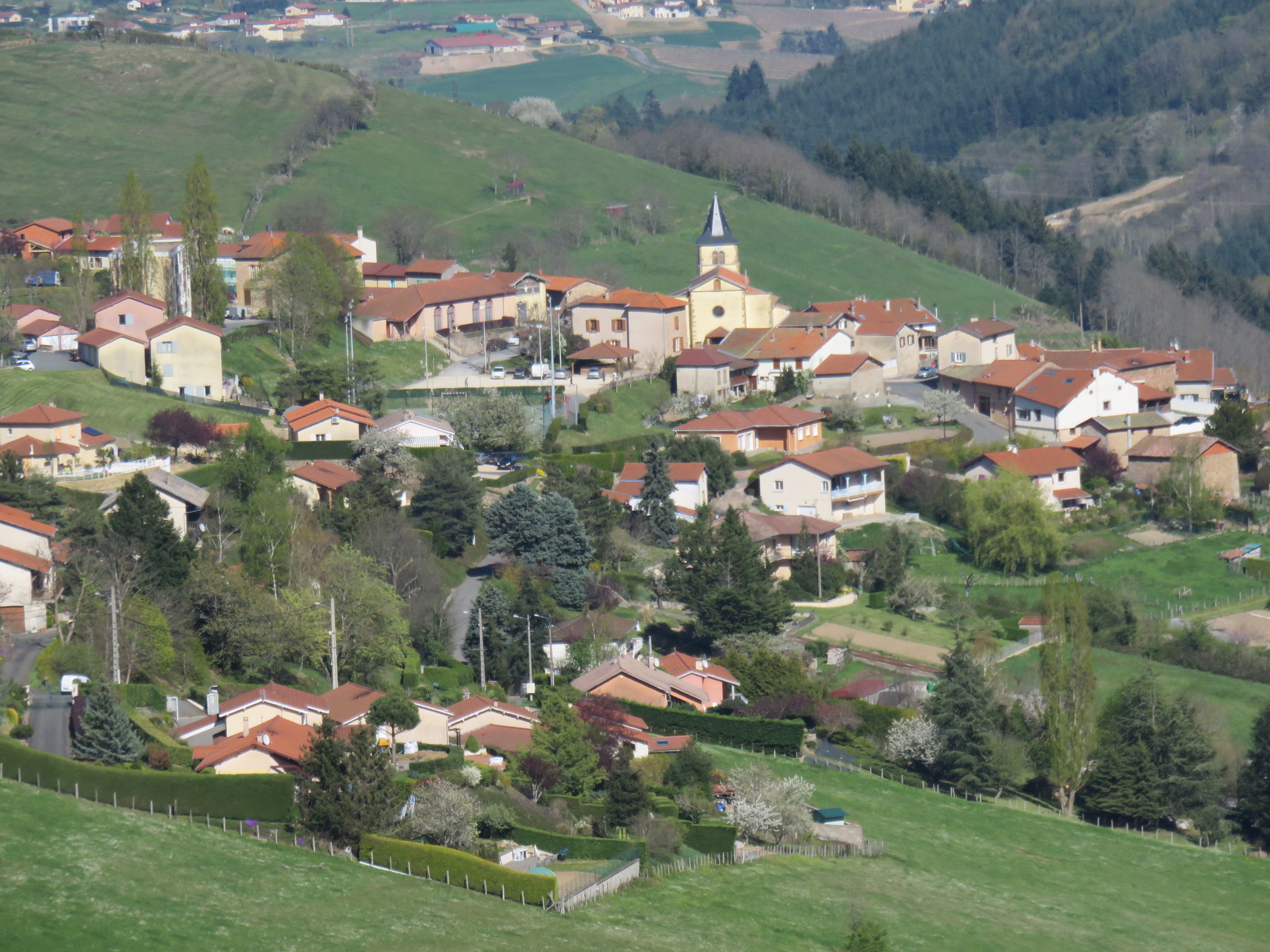 Vue sur le village de Saint-Marcel-l'Éclairé, dans le département du Rhône, en avril 2017.